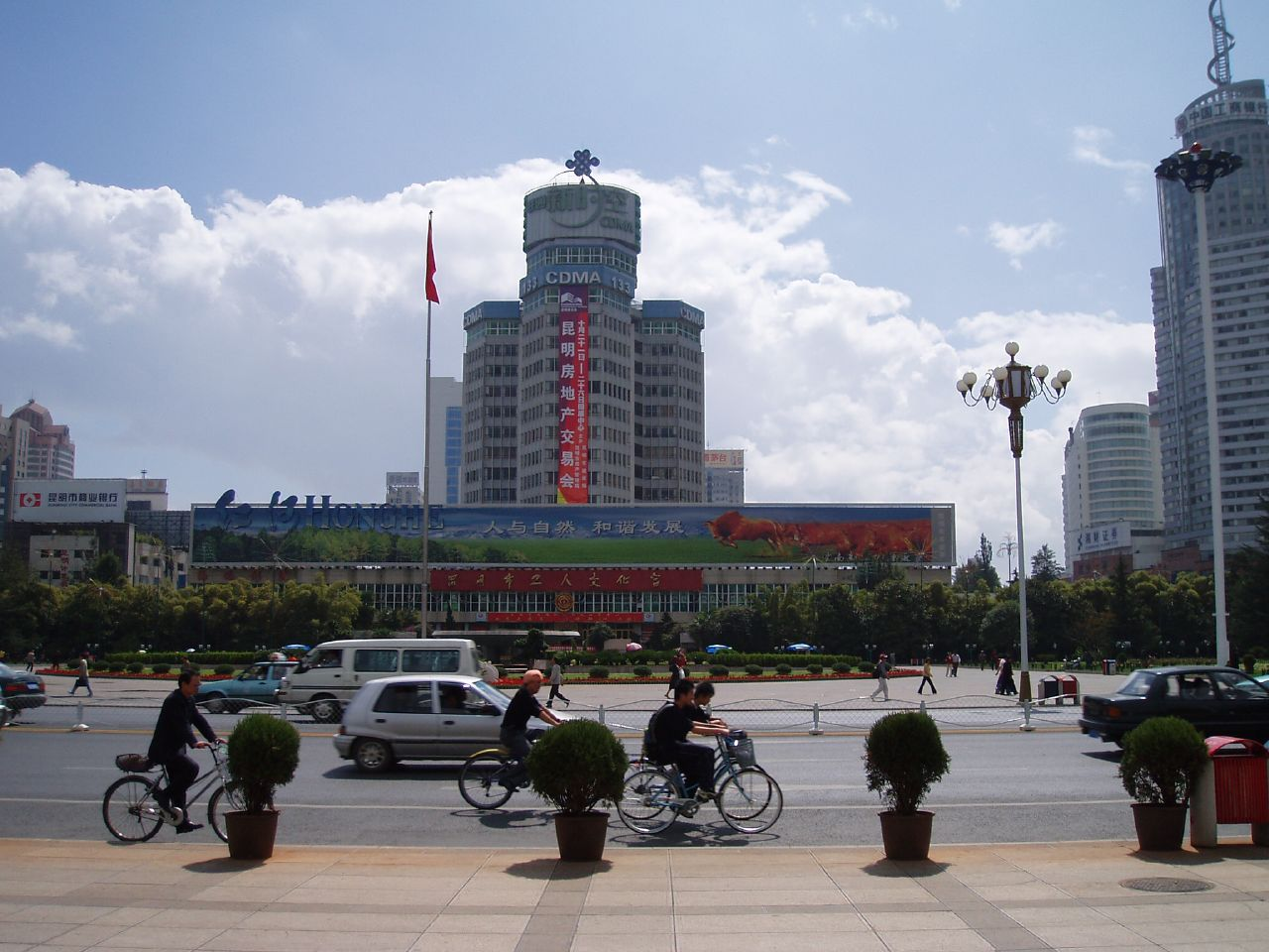 Kunming, Yunnan